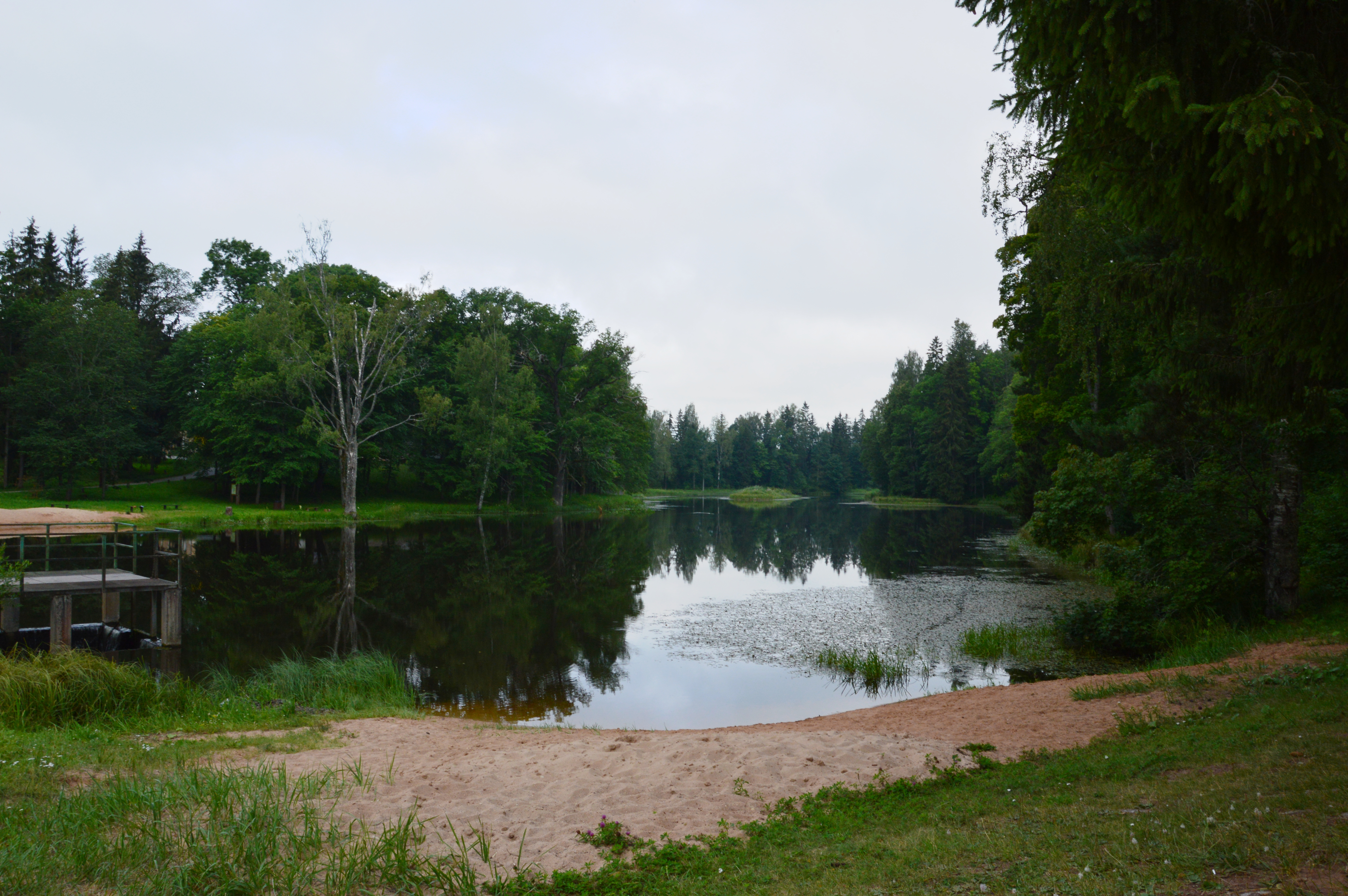 Suure-Kambja järv